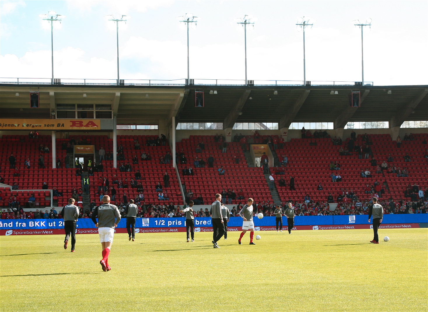 Sportsklubben Brann